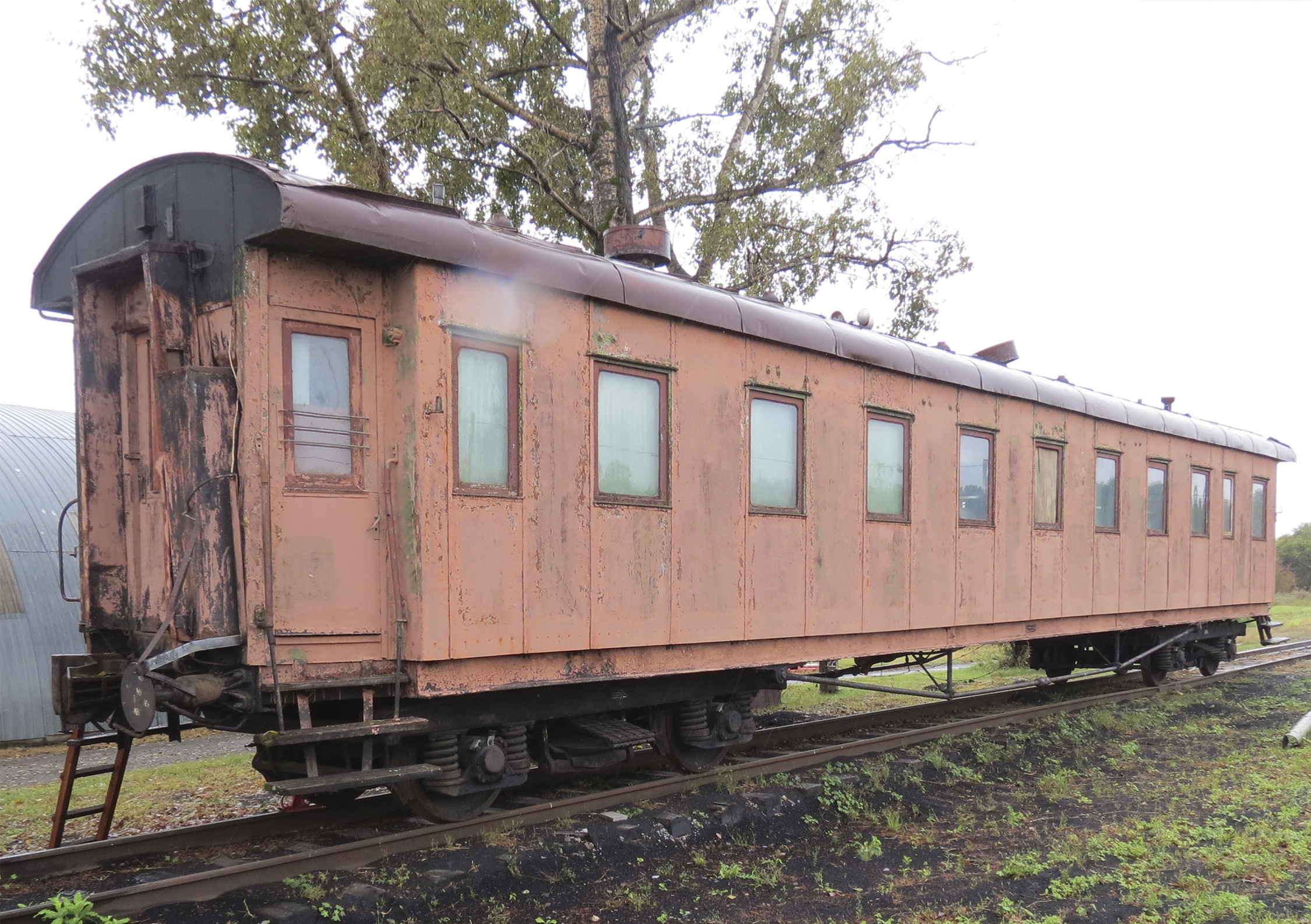 Вагон построен в 1940 году Калининским вагоностроительным заводом